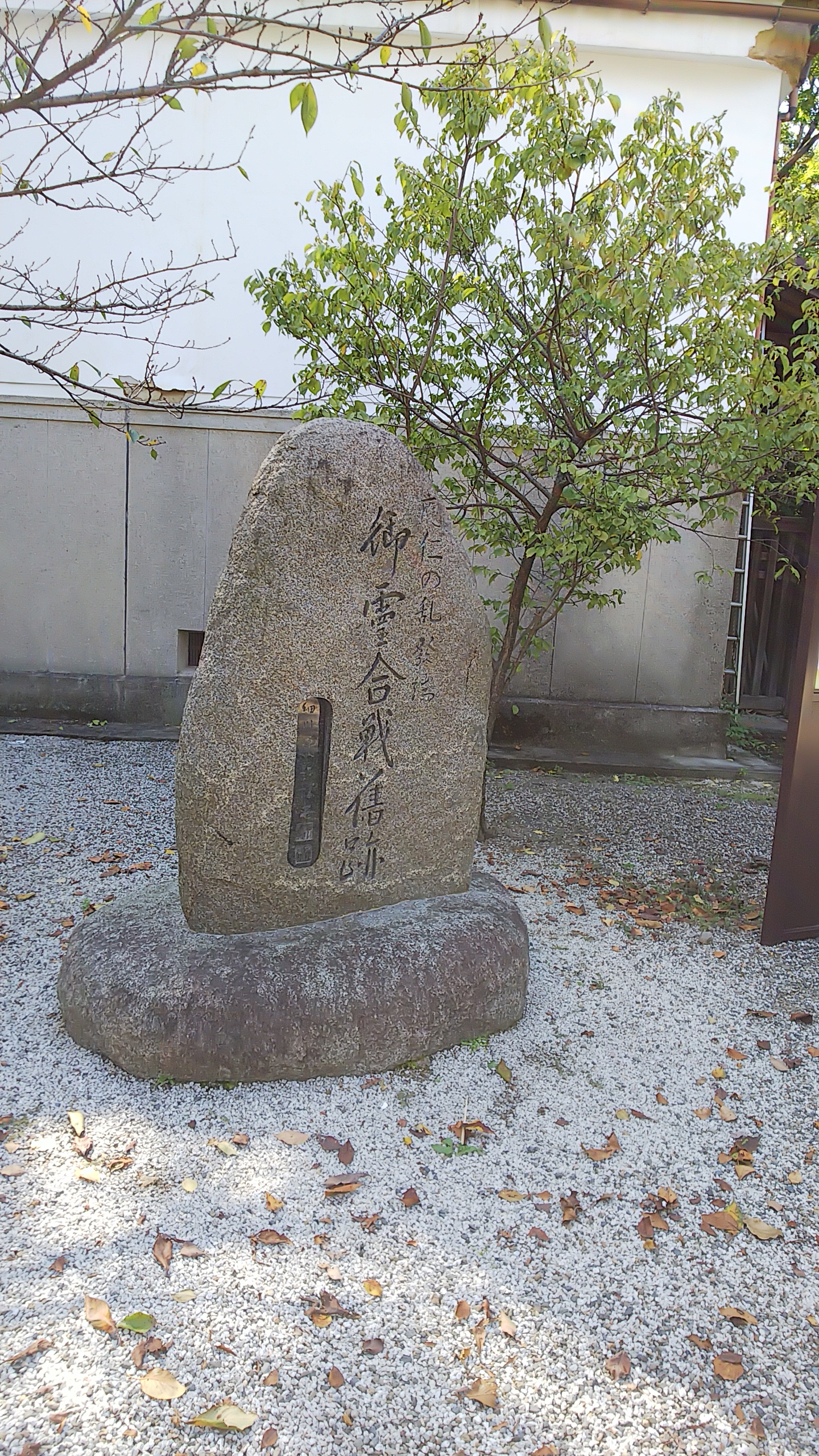 京都市上京区にある上御霊神社にある応仁の乱 発端 御霊合戦跡 石碑